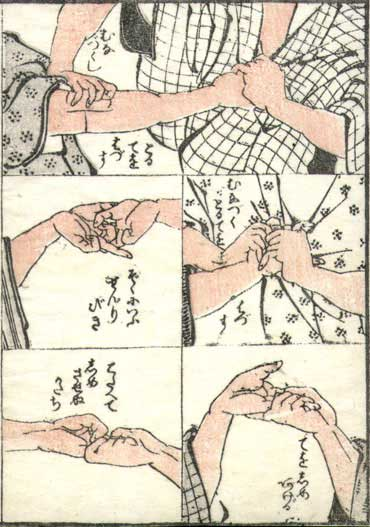 Hokusai 1760-1849, page extraite de Manga vol 8, techniques d'autodéfense.